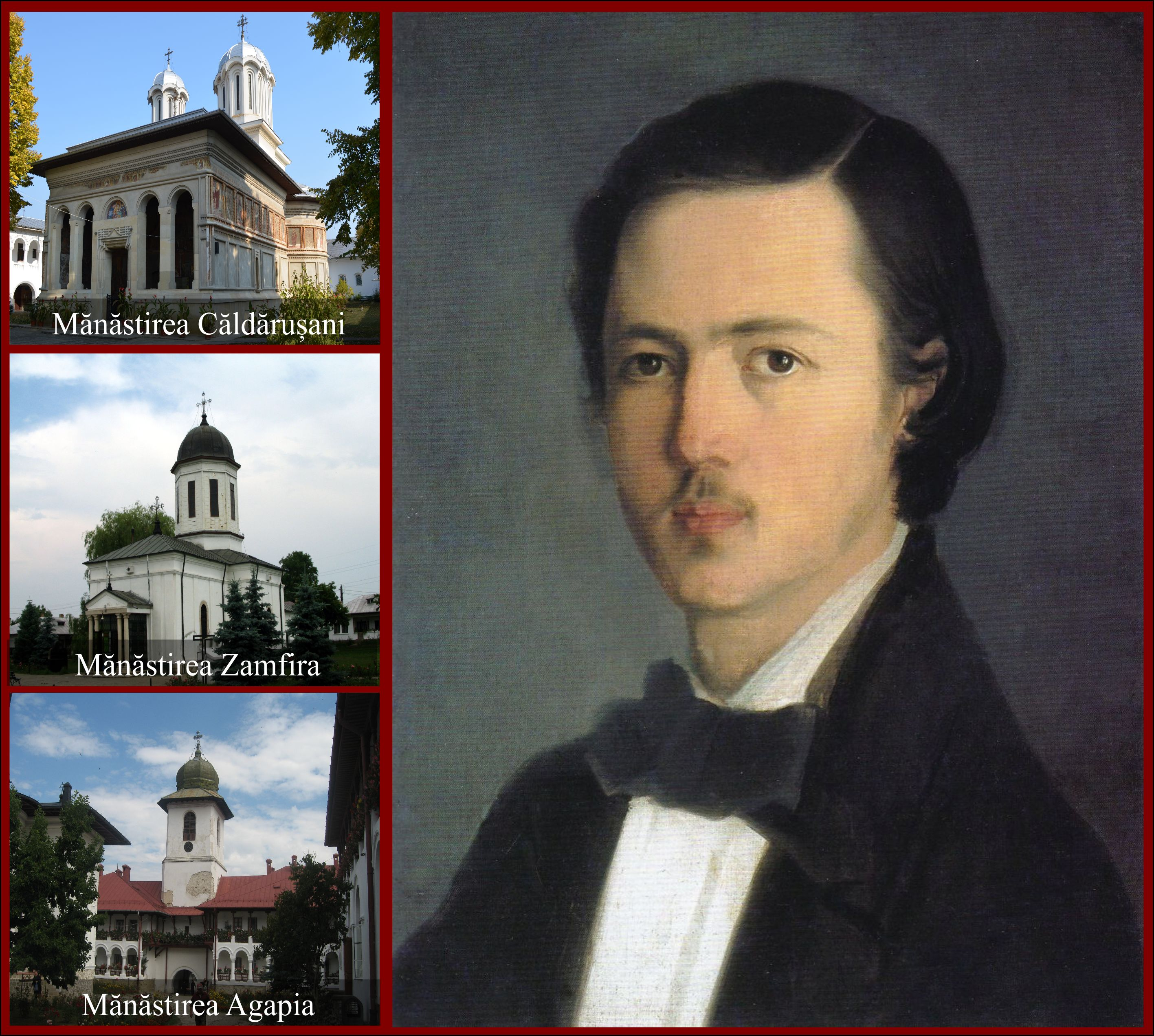 Colaj cu cele mai importante biserici unde a pictat Nicolae Grigorescu: Mănăstirea Căldărușani, Mănăstirea Zamfira și Mănăstirea Agapia.